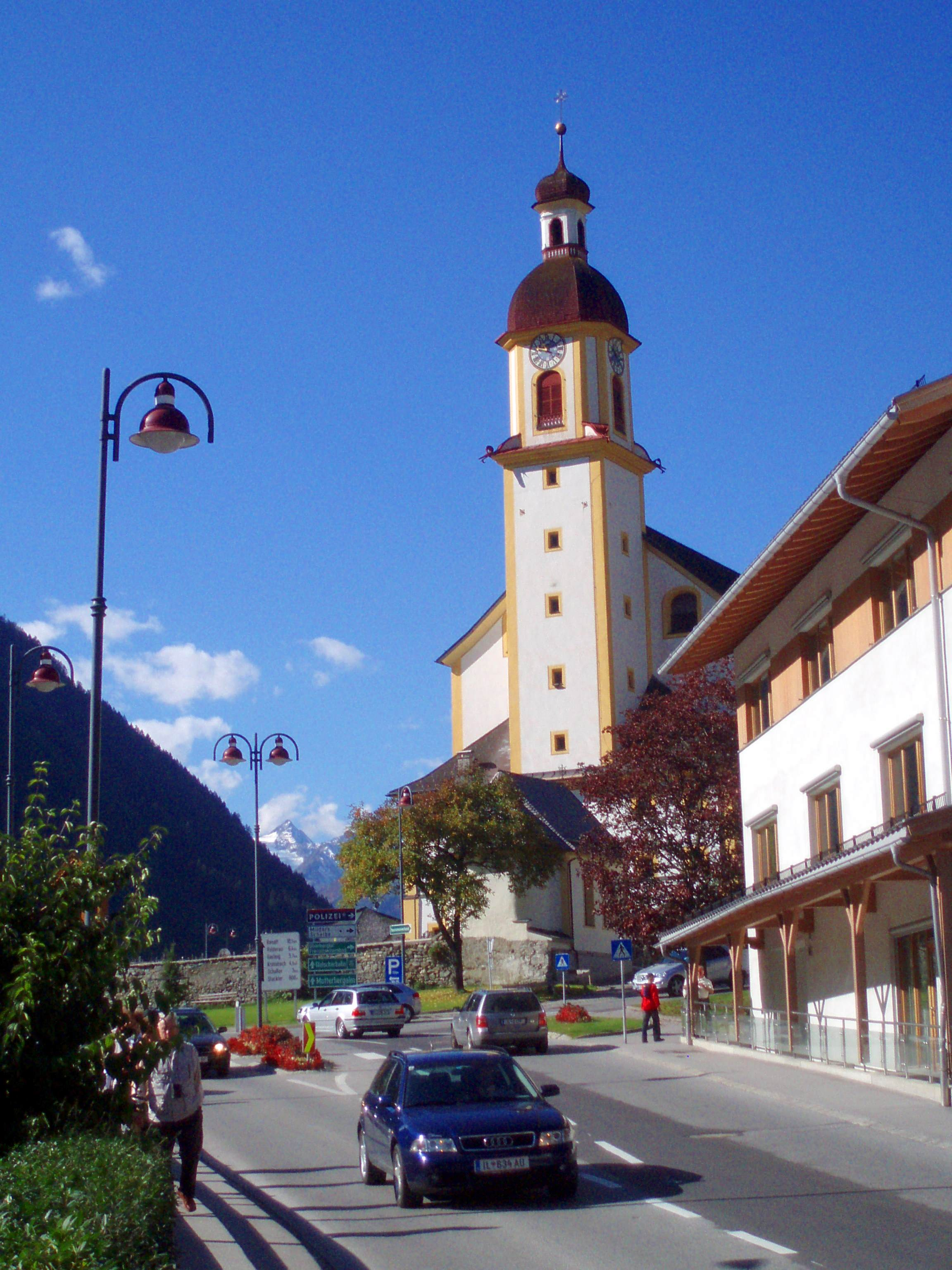 Ortsbild in Neustift im Stubai